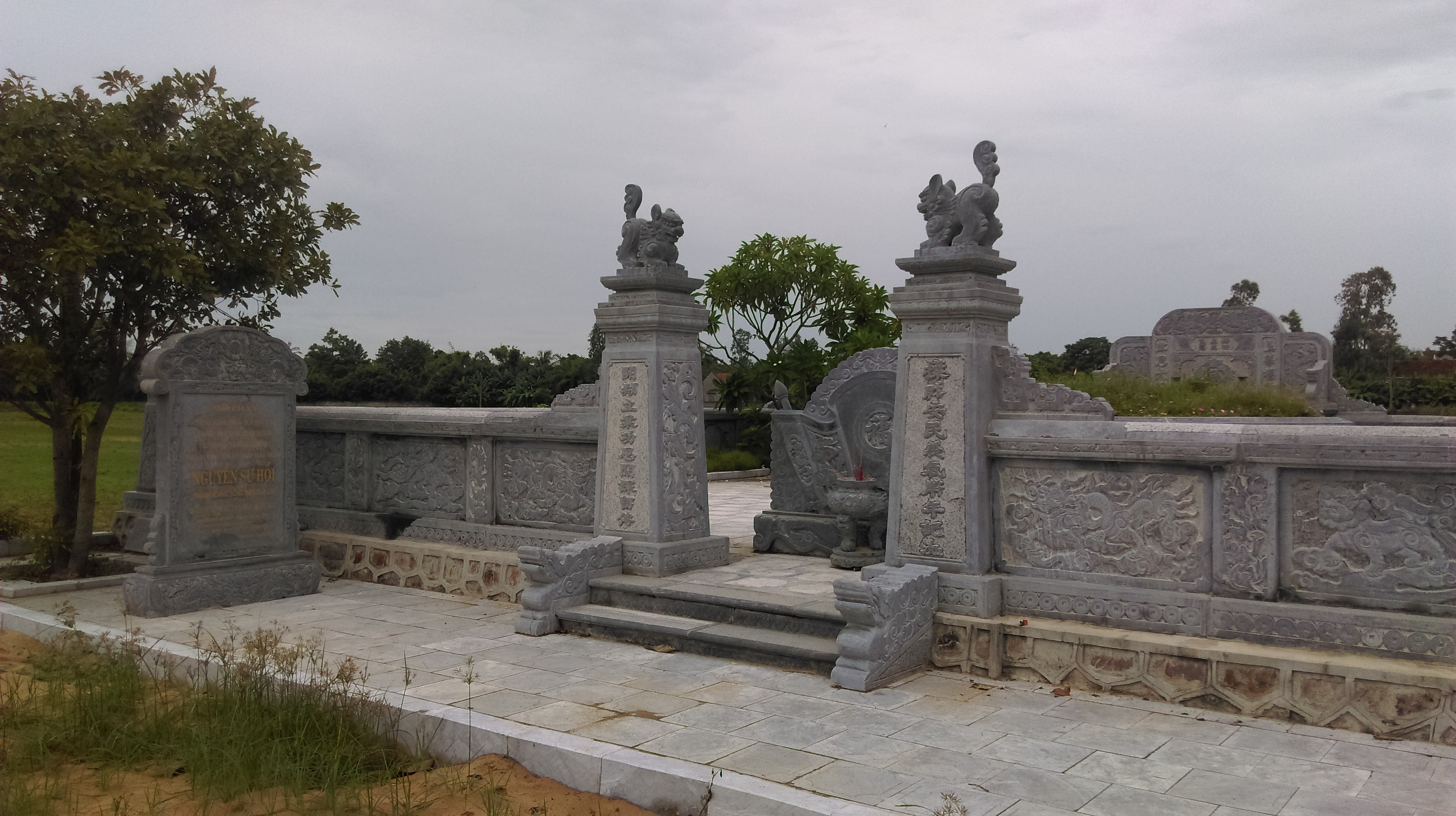 Phần mộ Nguyễn Sư Hồi